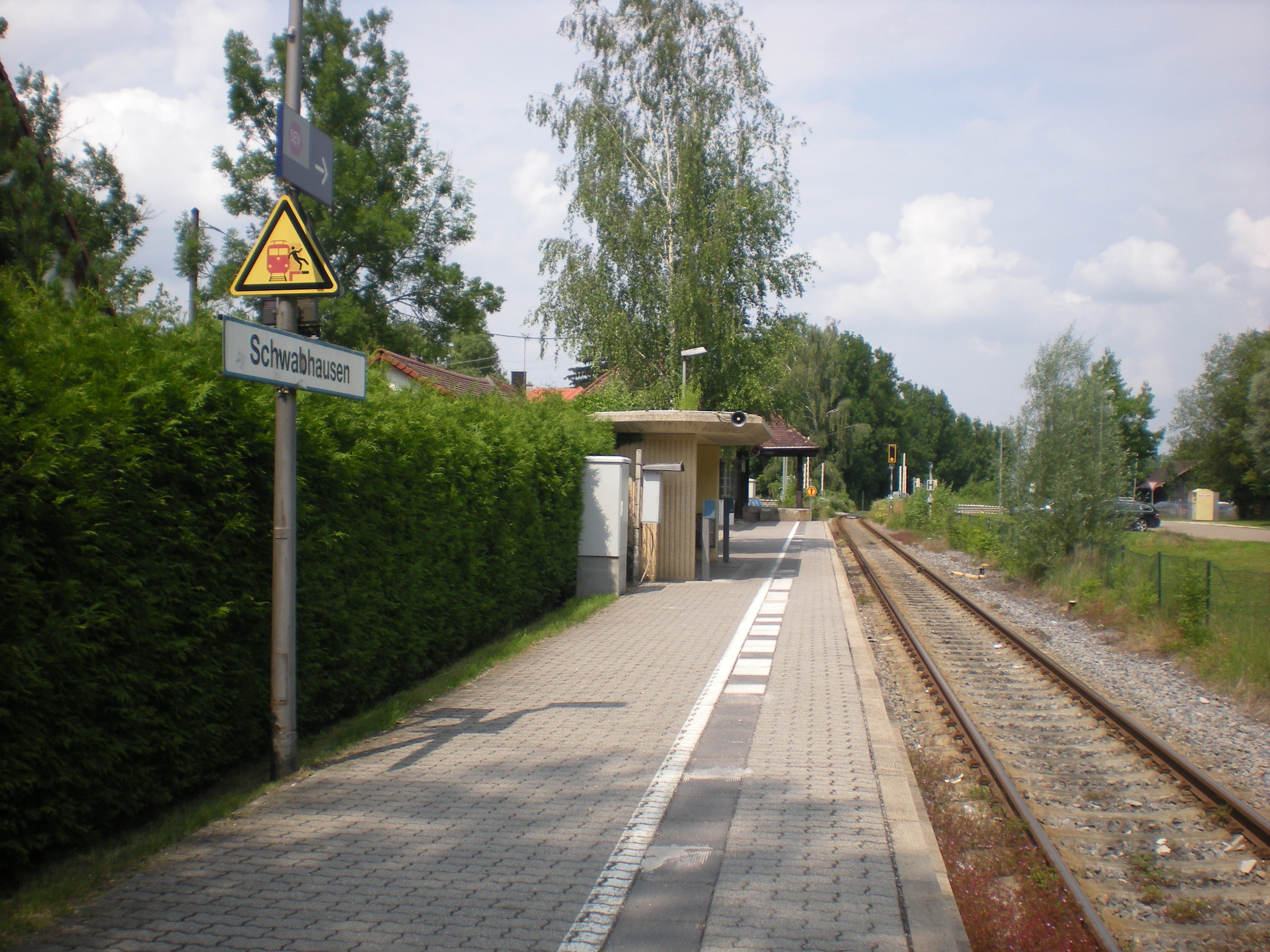 Seitenbahnsteig des Haltepunkts Schwabhausen (b Dachau) an der Bahnstrecke Dachau–Altomünster (Linie A)